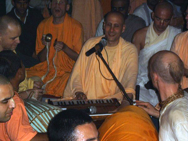 ISKCON Guru Radhanatha Swami leading kirtan